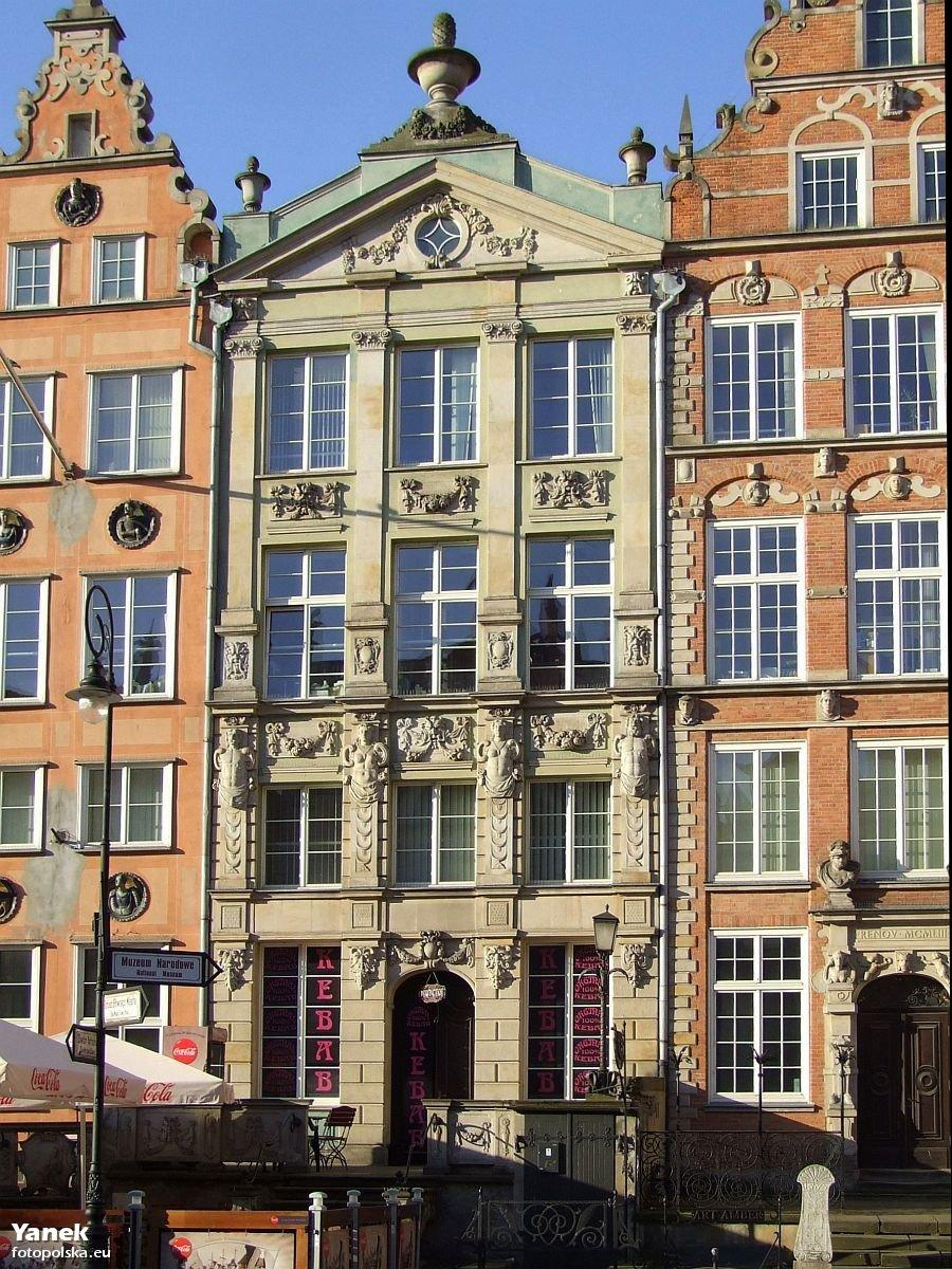 Gdańsk Główne Miasto, Długi Targ 4 (fragment), 3 i 2 (fragment) - kamienica pod nr 3, służyła, podczas pobytu Króla Polski w Gdańsku, jako jadalnia oraz sala sądu królewskiego.